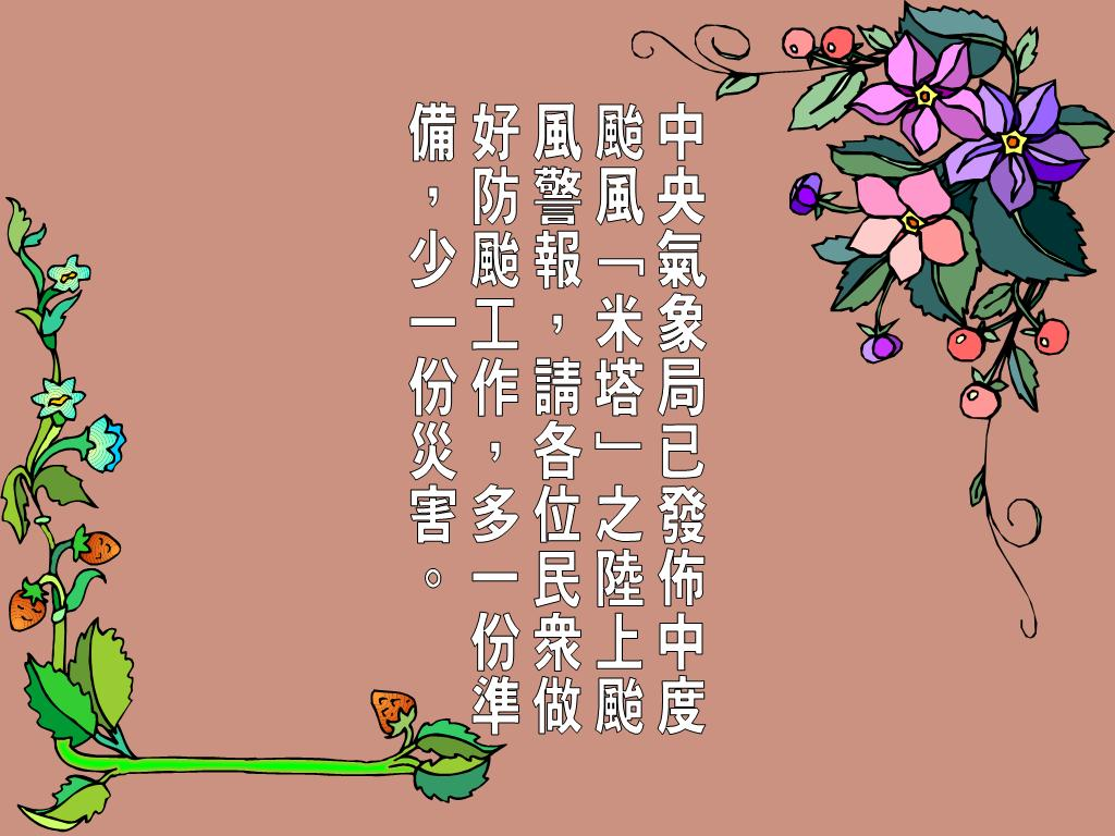 模擬中視版政令宣導字卡，此為防颱宣導範例。此為第三版，由76-7-14的節目中解嚴宣導字卡取色，並修正成背景顏色。颱風名稱「米塔」為虛構內容